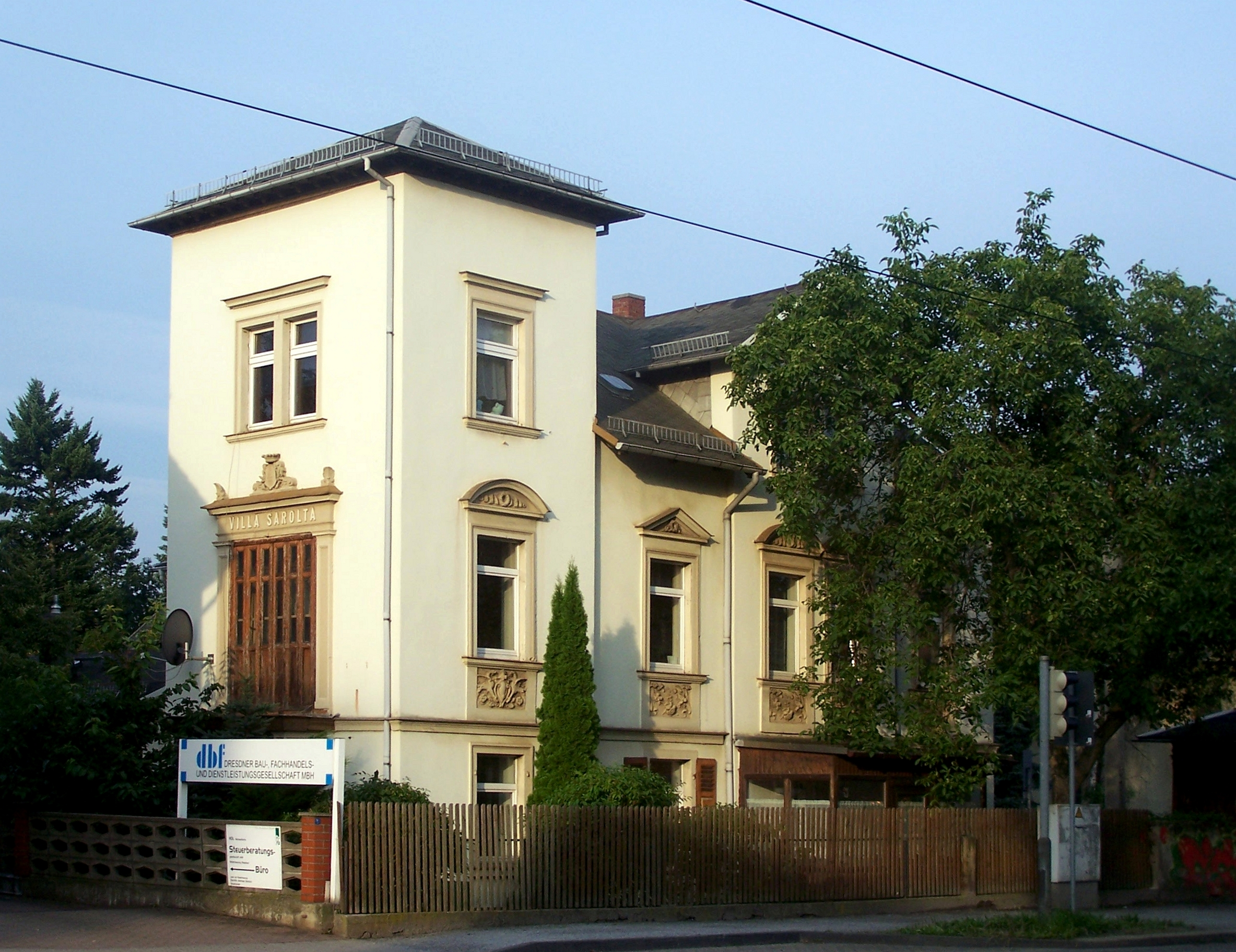 Schildenstr. 2 in Radebeul